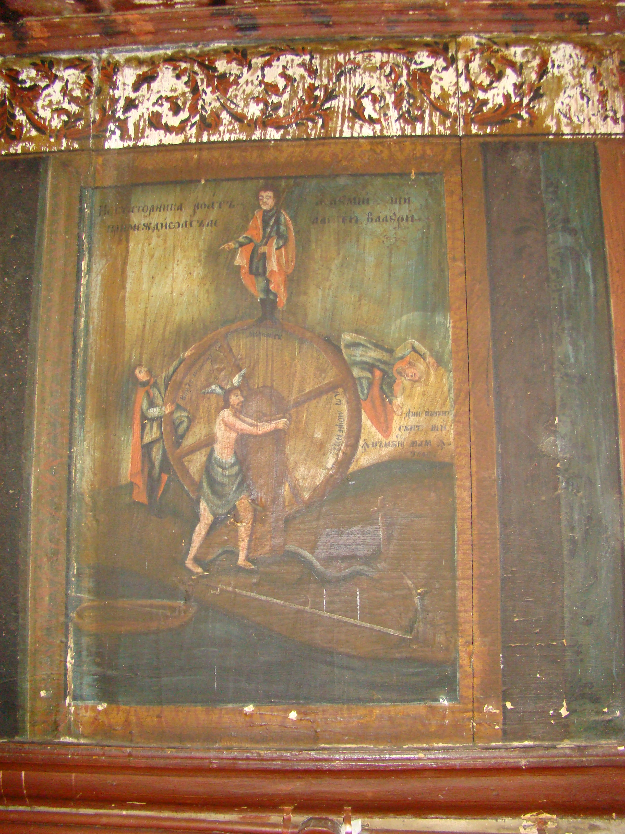 Biserica „Sf. Arhangheli Mihail și Gavriil” din Răstoci”, județul Sălaj